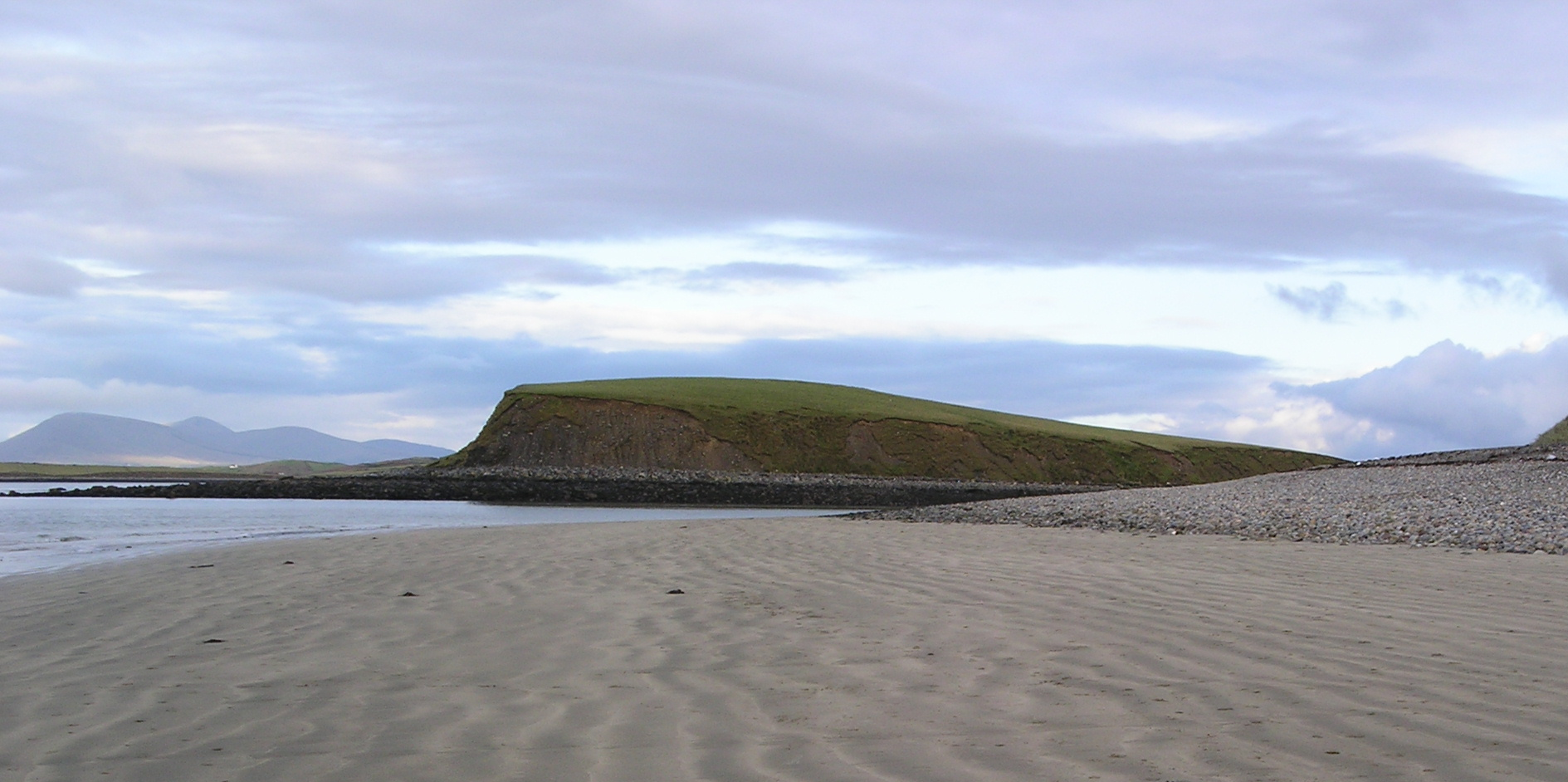 A drowned drumlin in Clew Bay